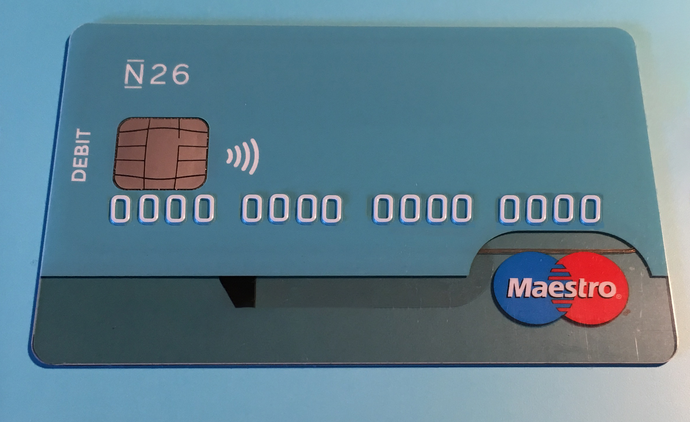 Foto (manipuliert) einer N26 Maestro International Card